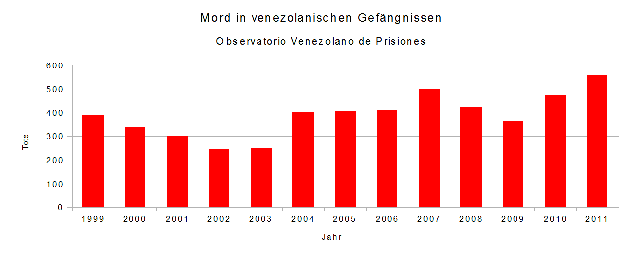 Mord in venezolanischen Gefängnissen laut Observatorio Venezolano de Prisiones